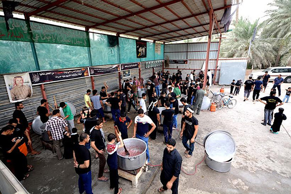 أثناء إعداد أحد المآتم للمحموص.